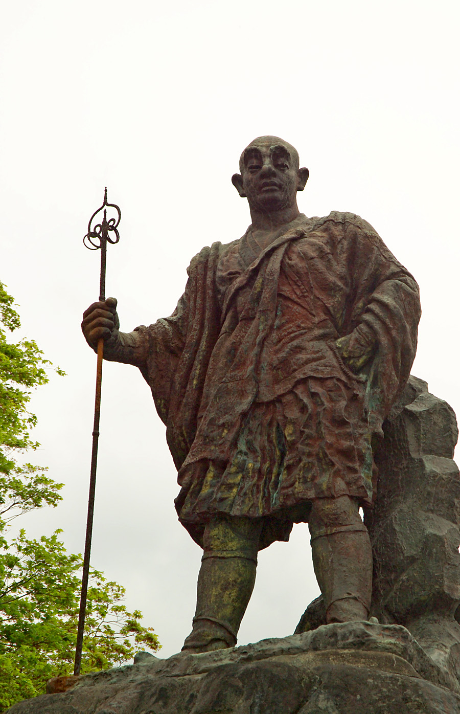 Statue of Shōdō Shōnin (勝道上人), founder of the temple that became the present Rinnōji in Nikko, Tochigi Prefecture, Japan, a UNESCO World Heritage Site. I took the photo and contribute it to the public domain. However, people and institutions may retain rights to images in it.